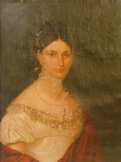 Zeitgenössiches Porträt Wilhelmines von Tunderfeldt-Rhodis, morganatische Ehefrau Wilhelm Friedrich Philipps von Württemberg (1777-1822)